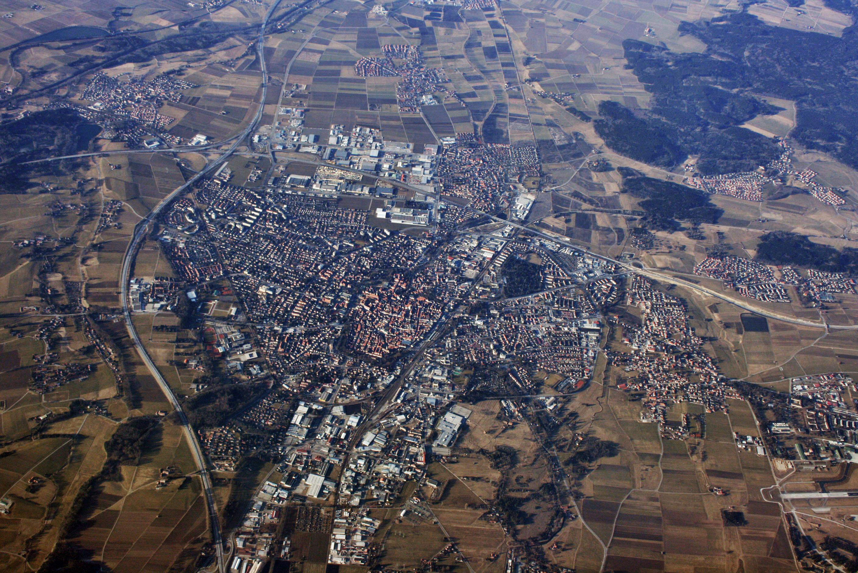 Luftaufnahme von Memmingen